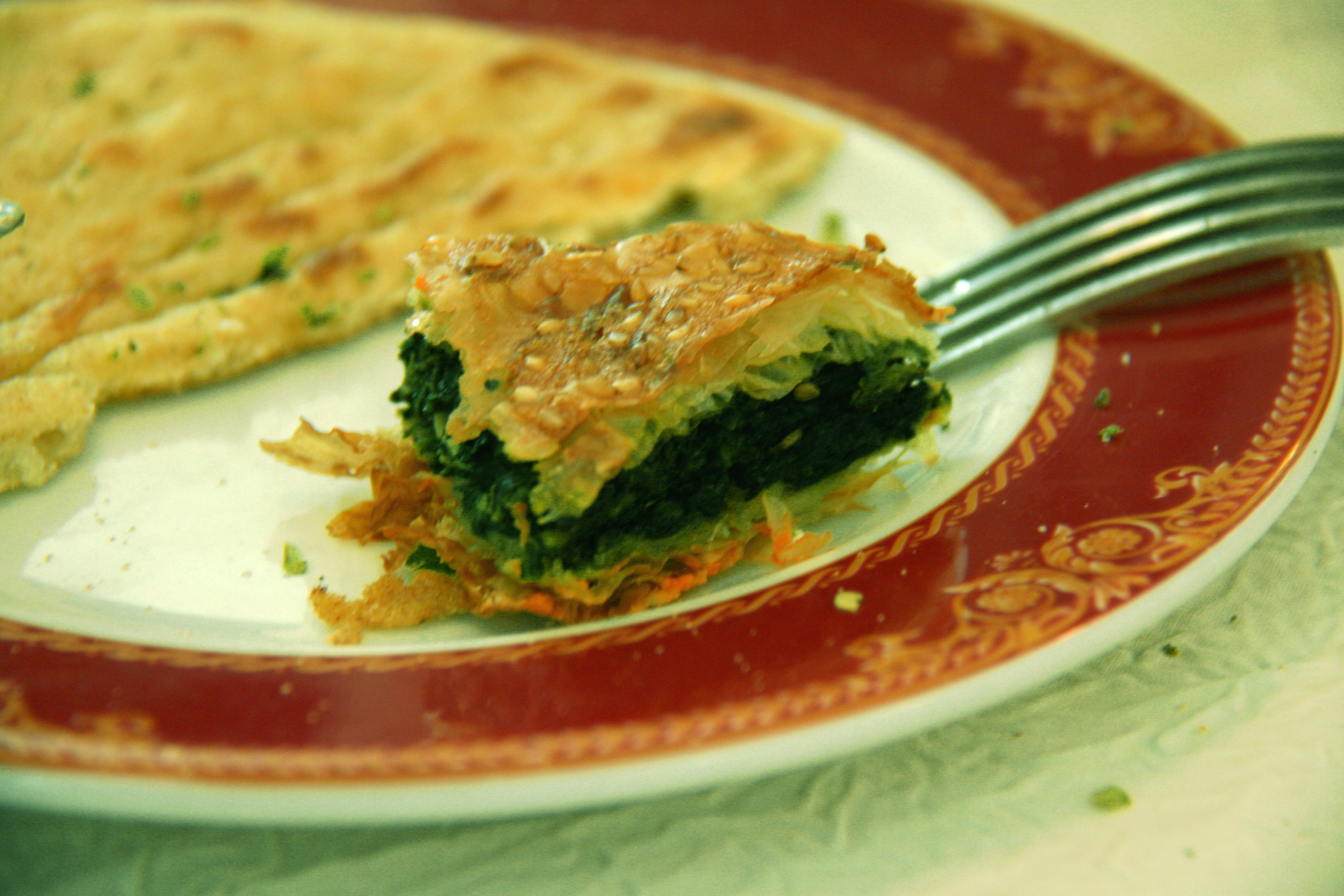 Burek